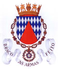 Fuzileiros